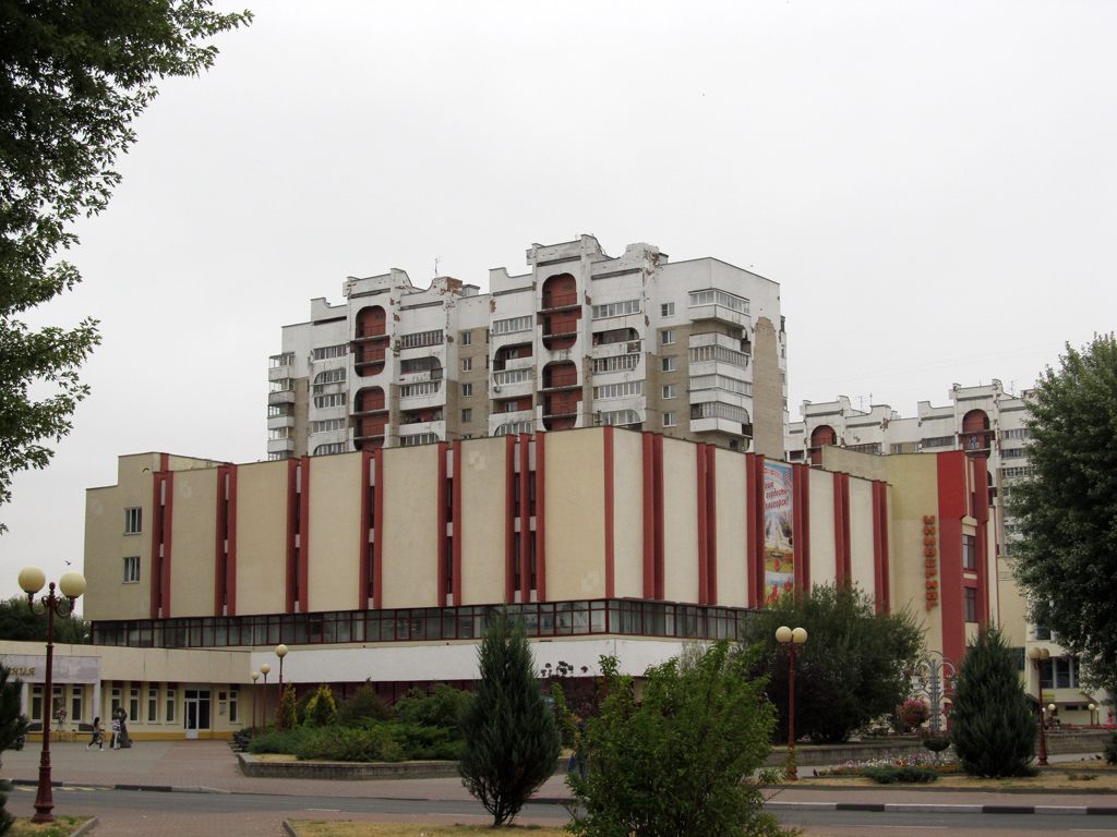 Салігорск. Забудова вуліцы Леніна